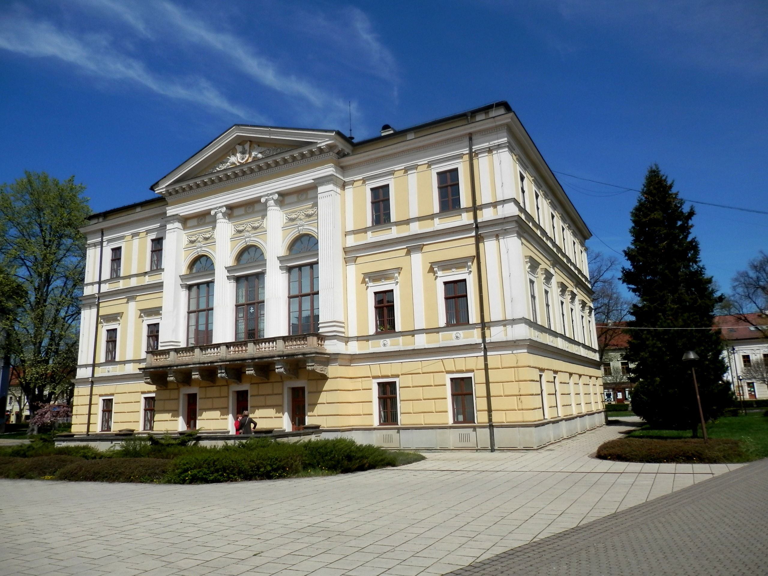 Budova radnice, (zaužívaný názov Mestský dom) je vedená v zozname národných kultúrnych pamiatok SR. Prevládajúci sloh klasicizmus. Doba vzniku 1777-1779. Radničné námestie. Mesto Spišská Nová Ves.